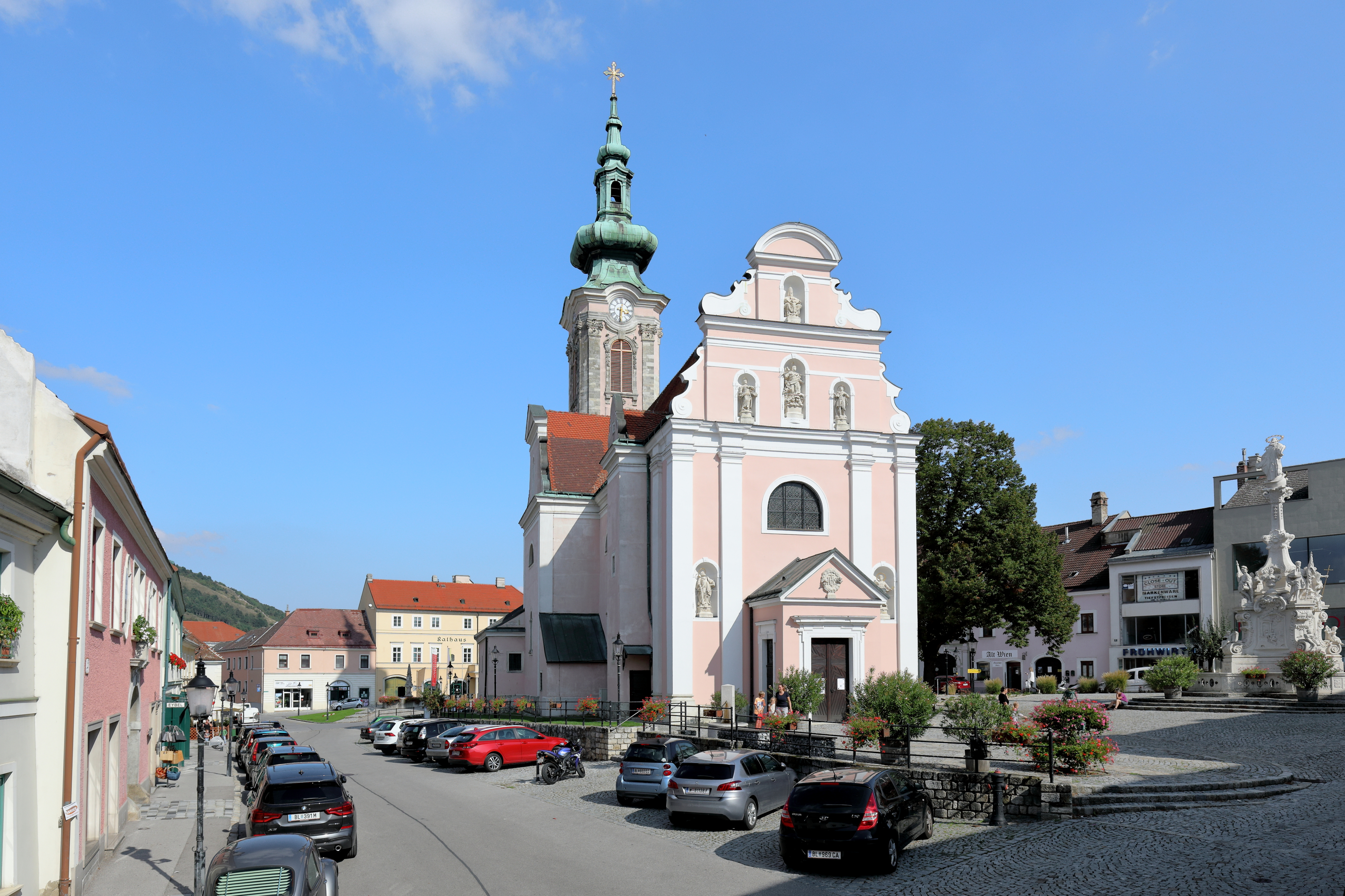 Westnordwestansicht des Hauptplatzes der niederösterreichische Stadtgemeinde Hainburg an der Donau mit der röm.-kath. Pfarrkirche hll. Philippus und Jakobus im Zentrum und ganz rechts die barocke Mariensäule.